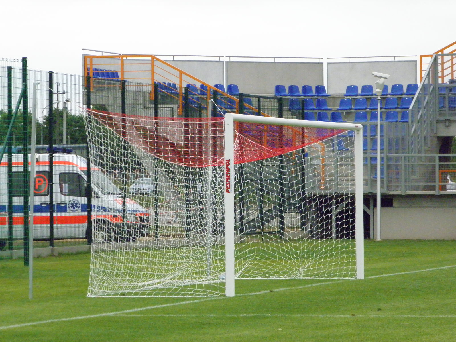 Siedlce-stadion na Błoniach-bramka